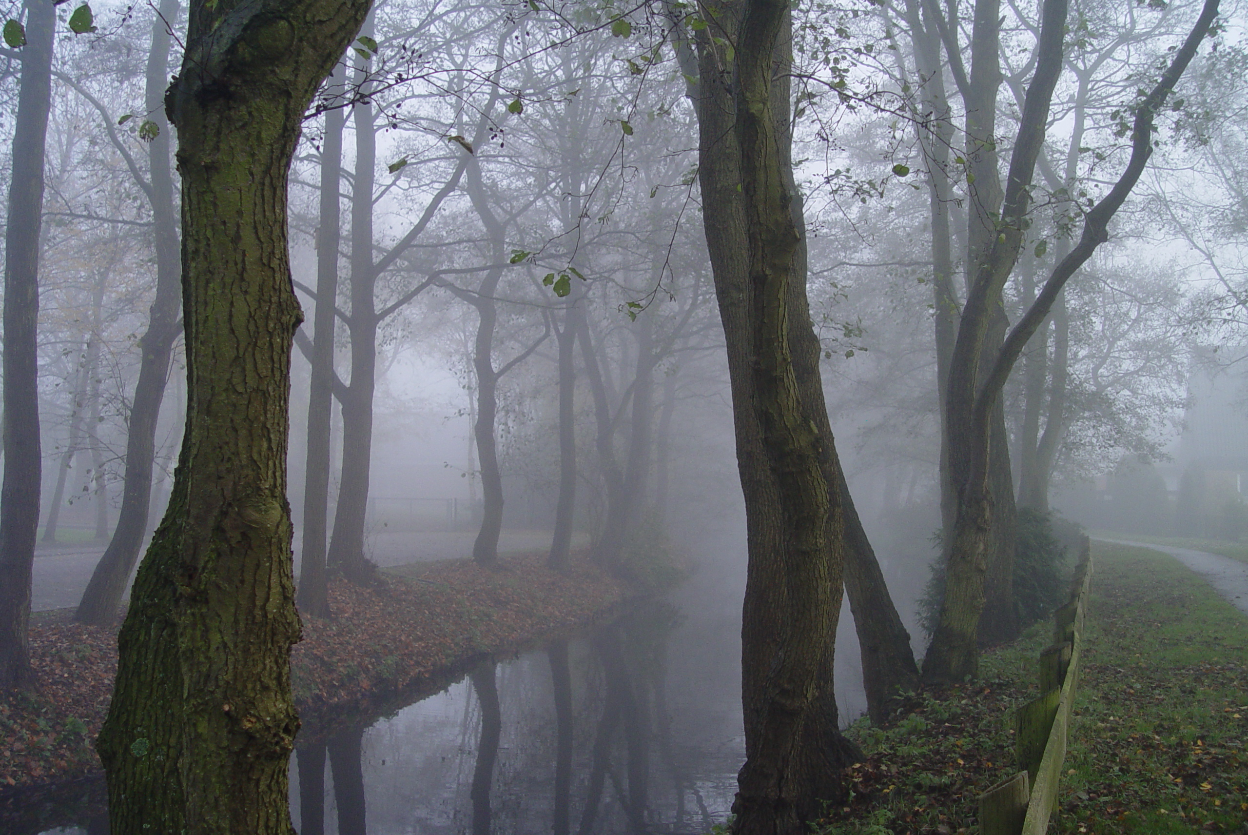 Fehnkanal Norden. Der Fehnkanal wurde früher genutzt um Torf mit Treidelkähnen vom Berumerfehner Moor in die Stadt zu bringen